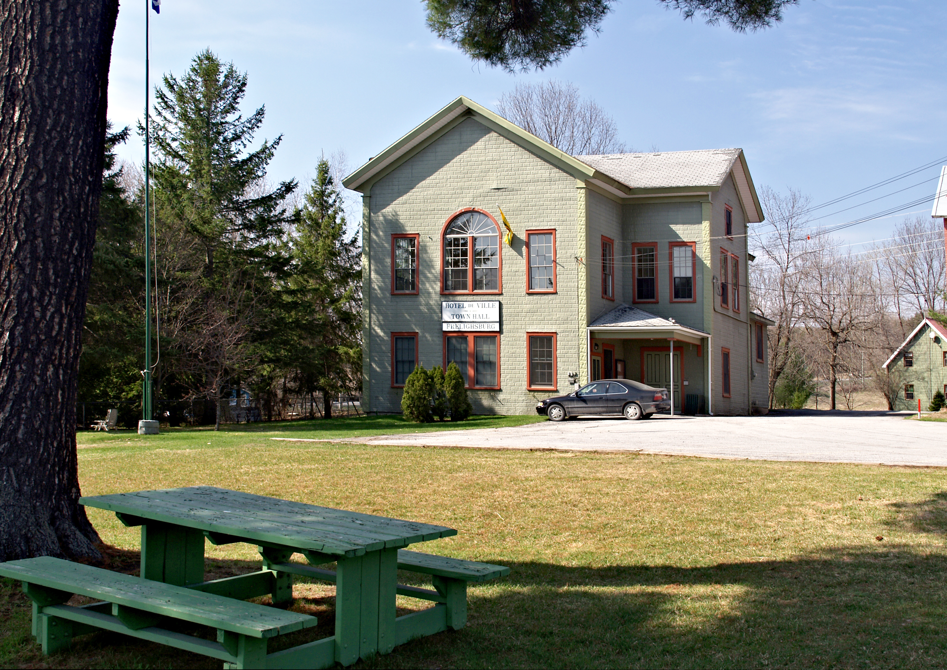 Frelighsburg - Hôtel de Ville/Townhall